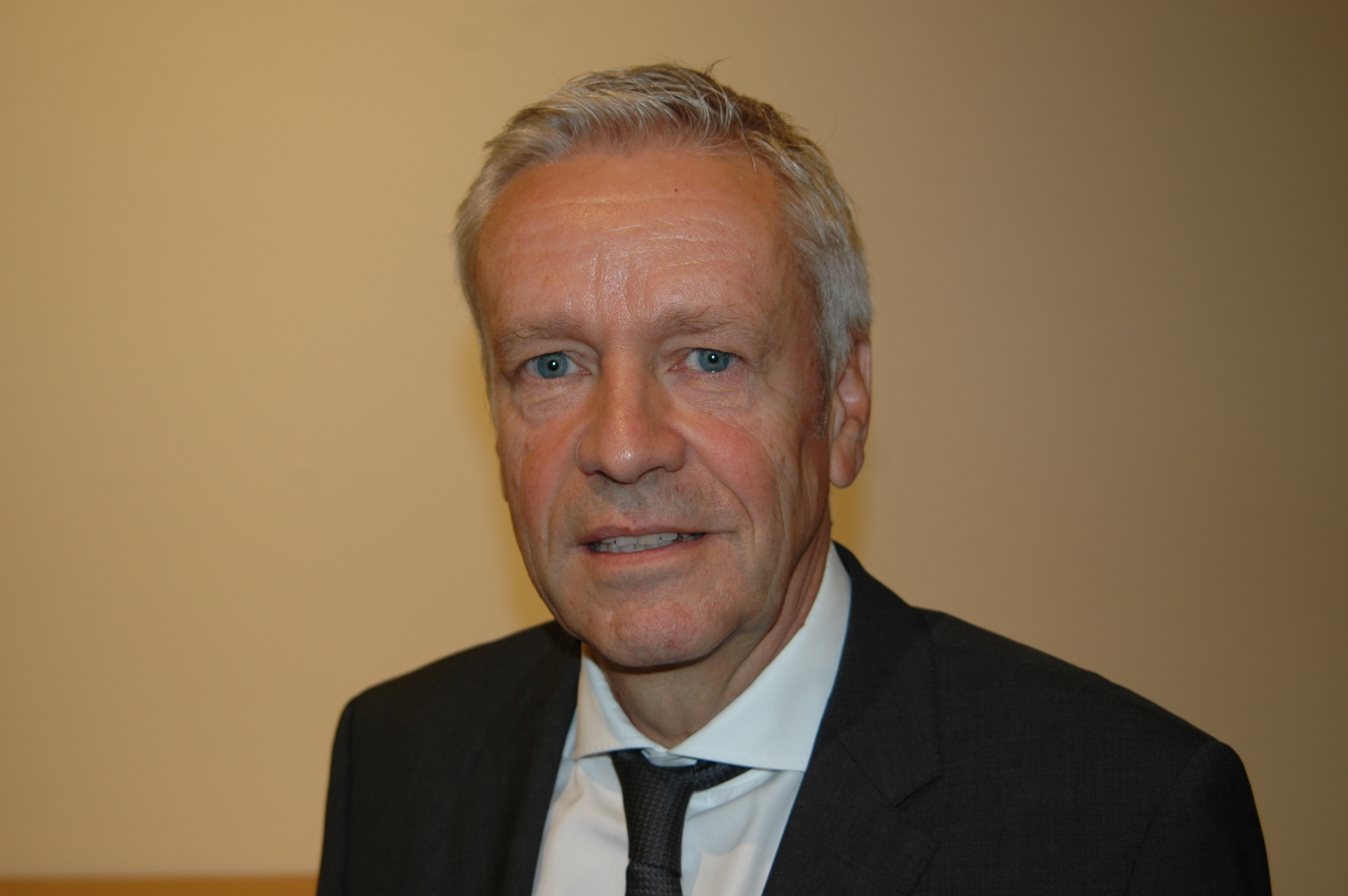 Henning H. Ohlsson, Geschäftsführer Epson Deutschland GmbH, MAKK